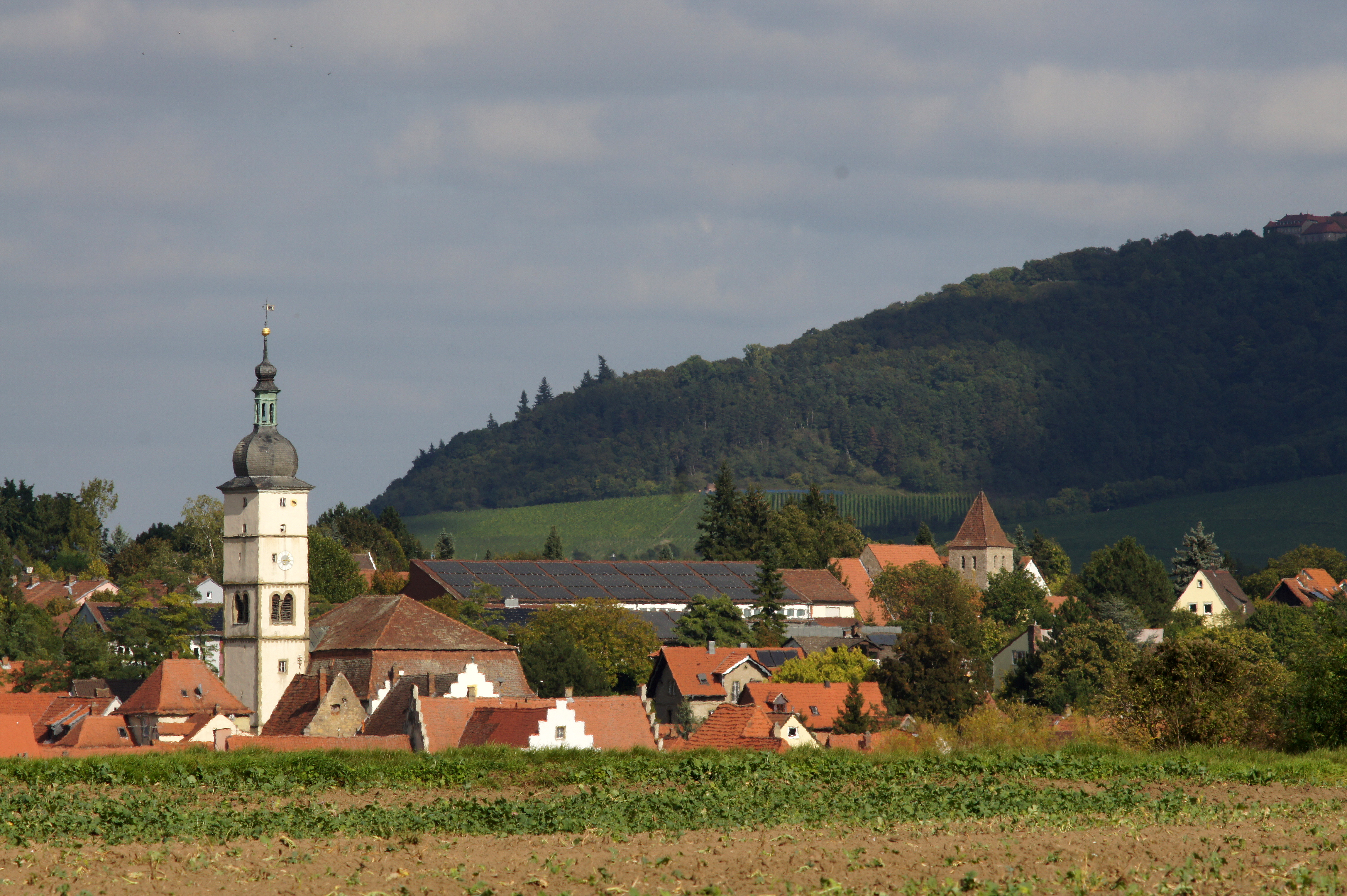 Mainbernheim mit markantem Turm der evangelischen Kirche